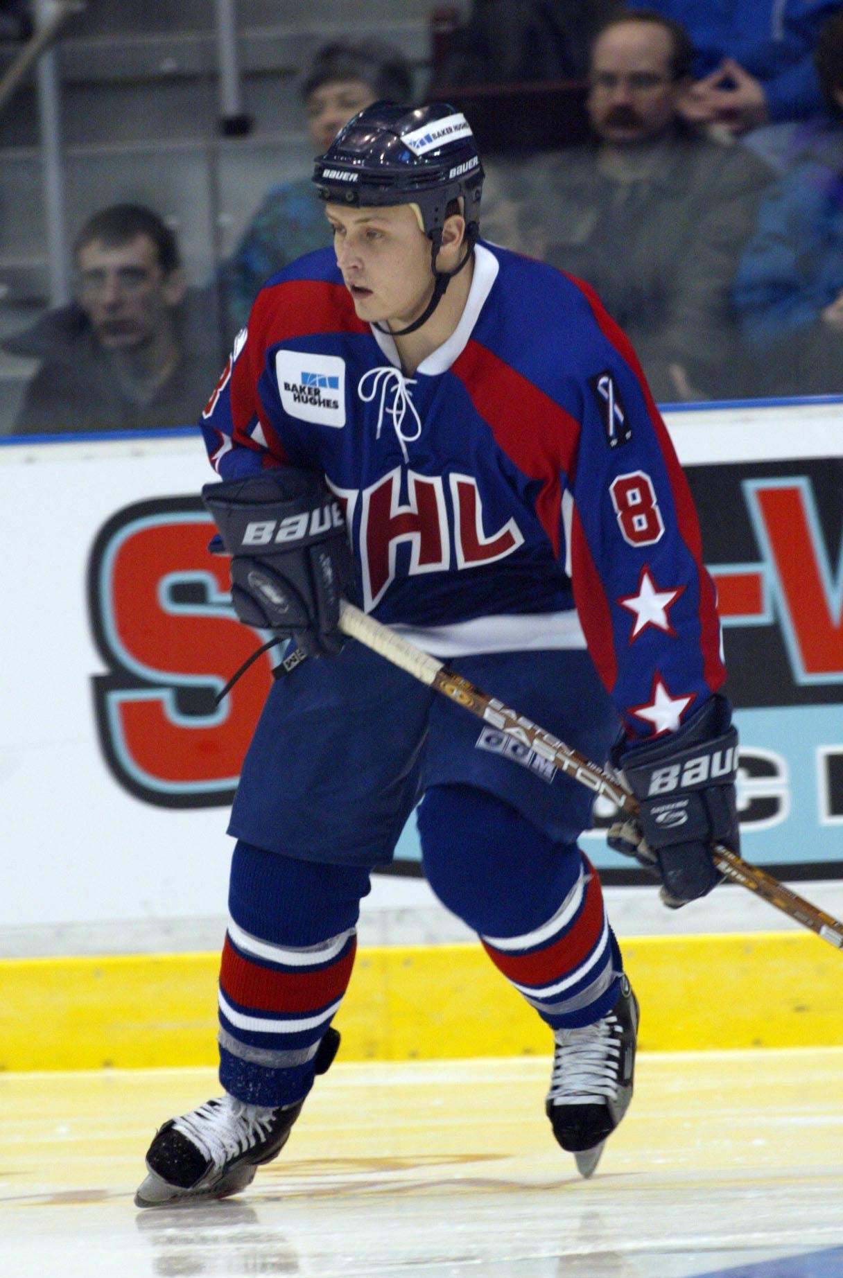 AHL All-Star Game 2002